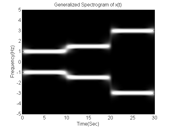 Generalized Spectrogram with two Gabor sigma = 0.1 and 1.4 respectively